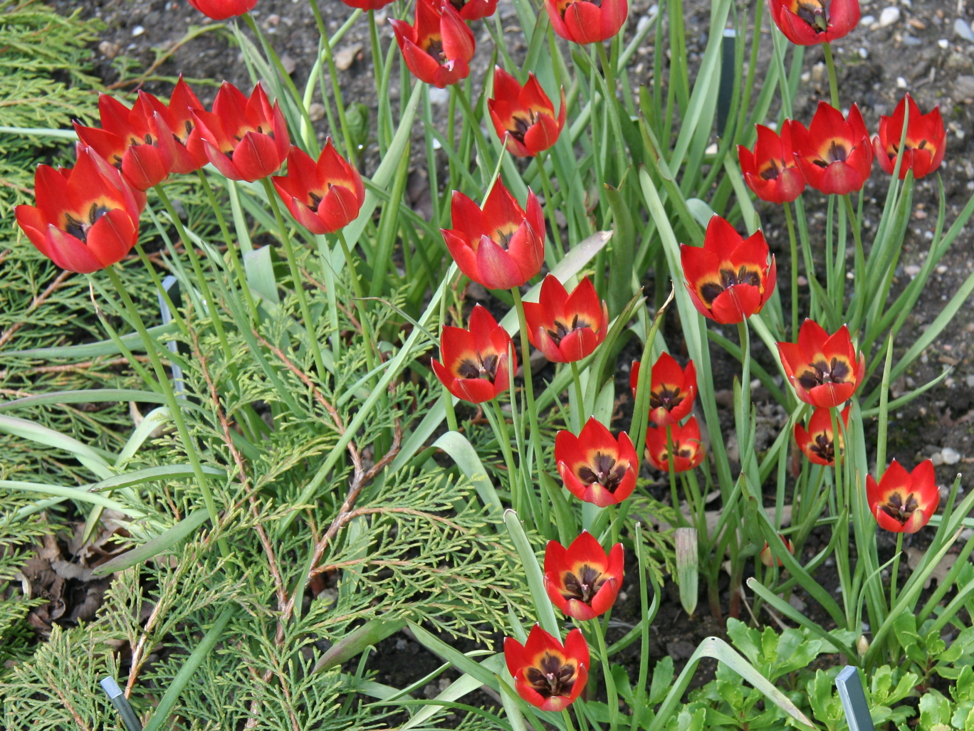 Tulipa orphanidea im Botanischen Garten Dresden